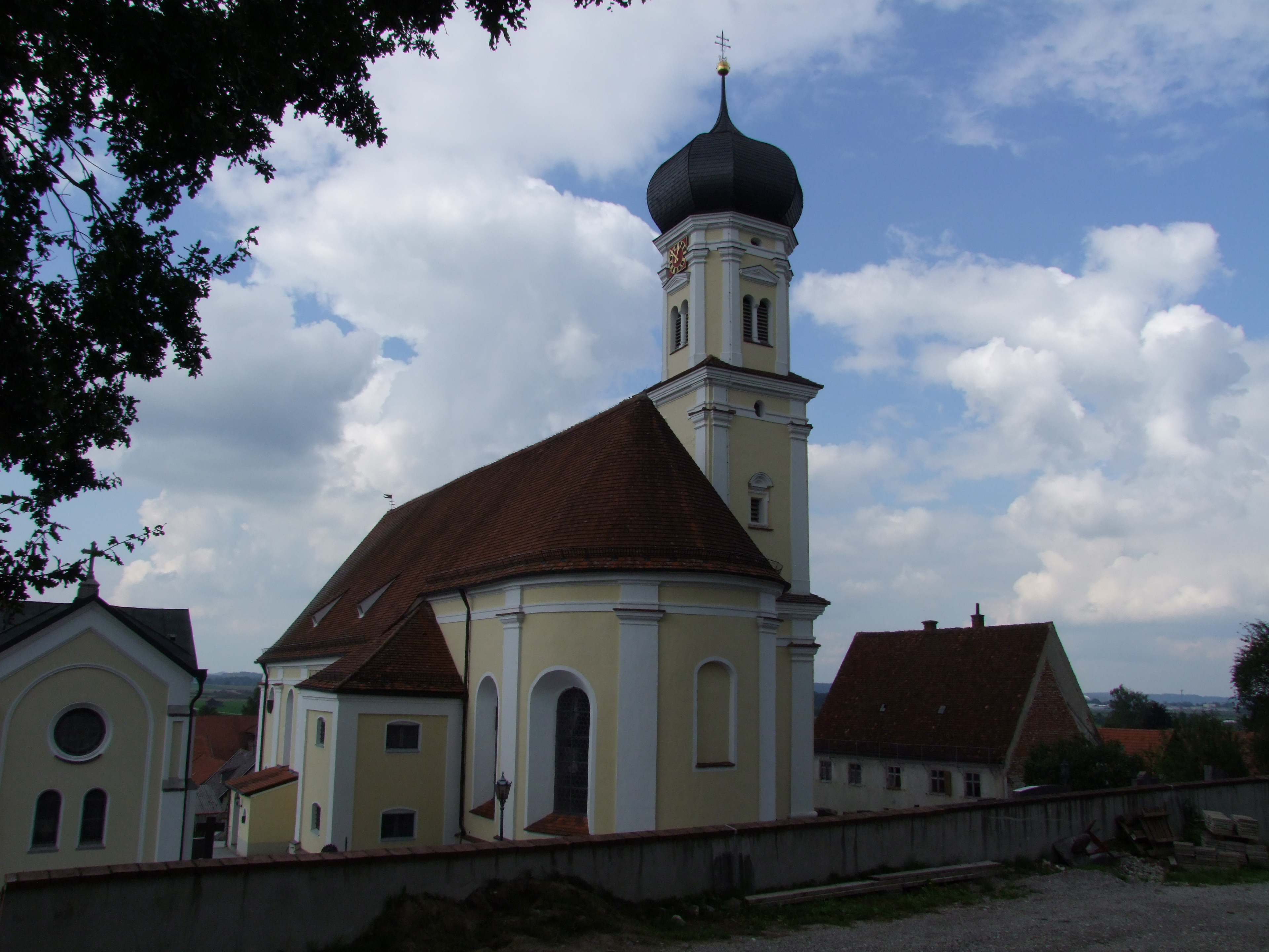 St. Jakobus der Ältere im oberschwäbischen Mindelau, einem Ortsteil der Stadt Mindelheim in Bayern/Schwaben